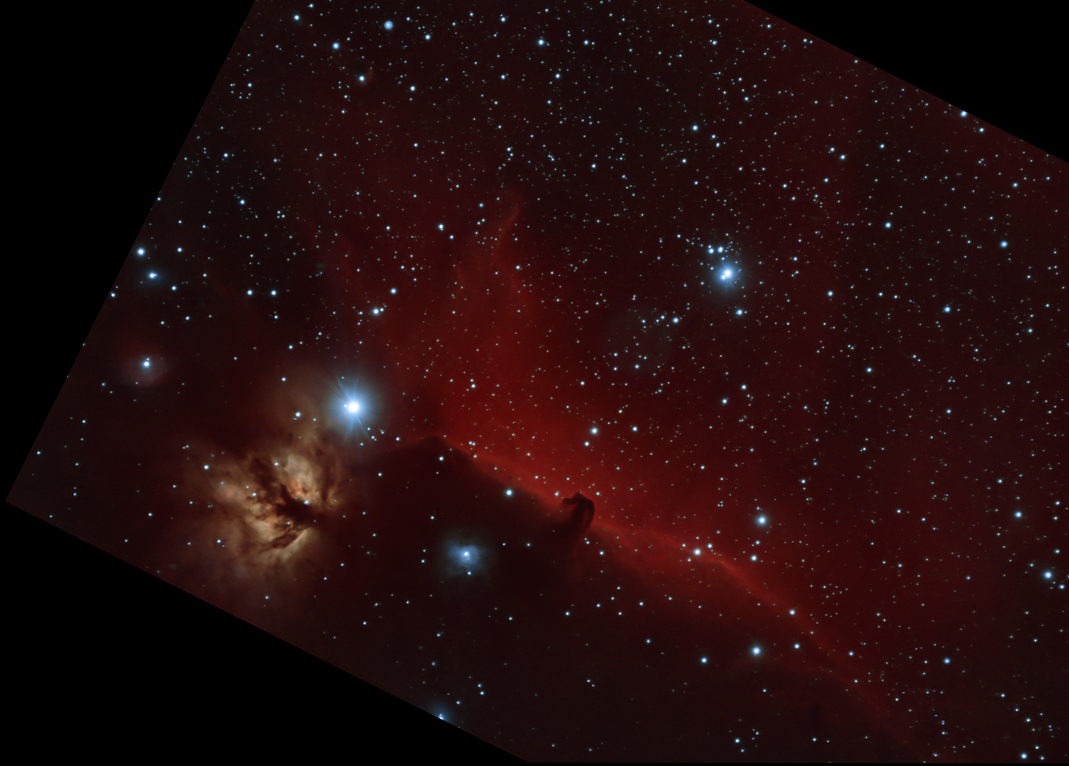 IC434 HaRVB